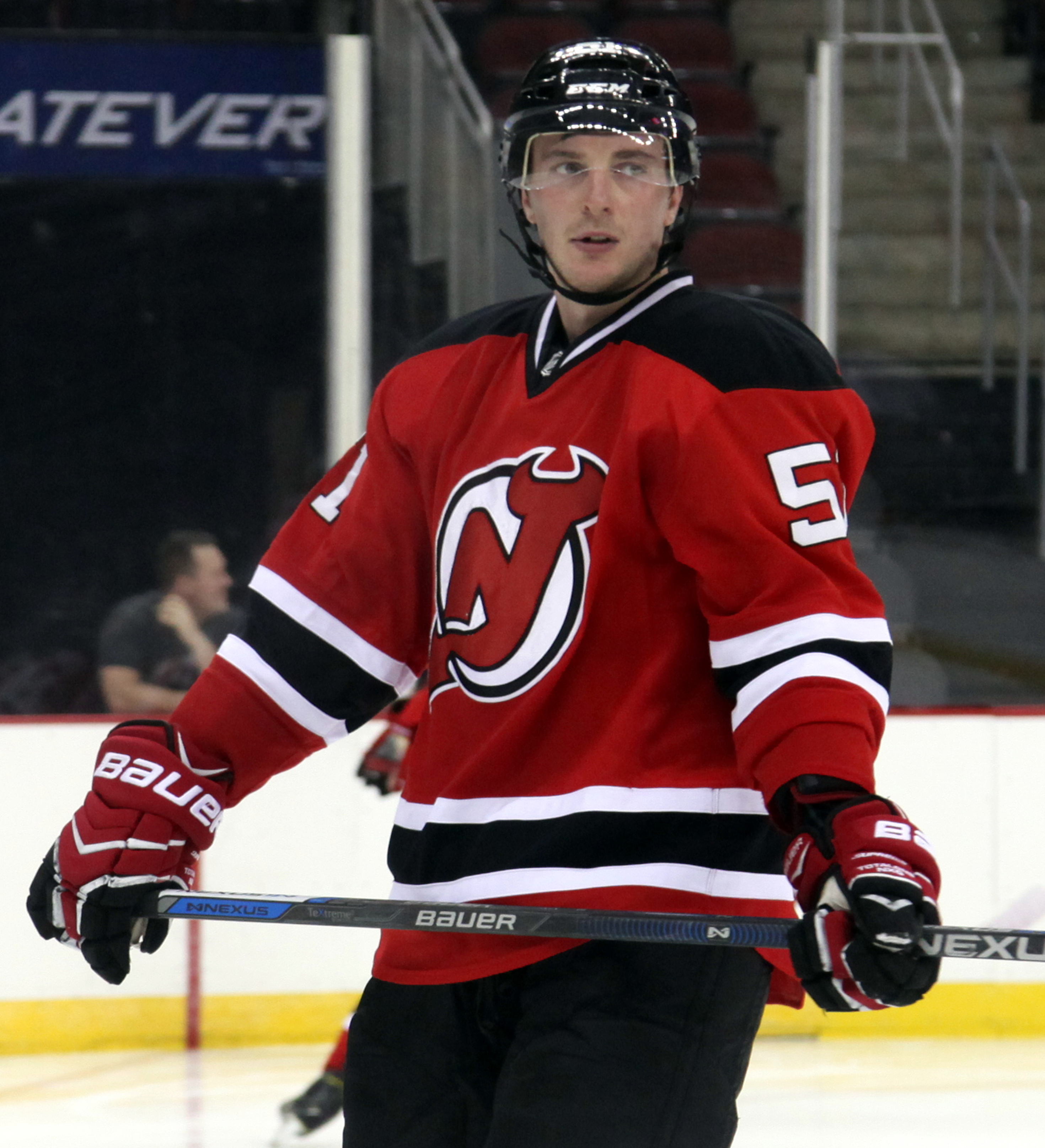 Kalinin in September 2015.